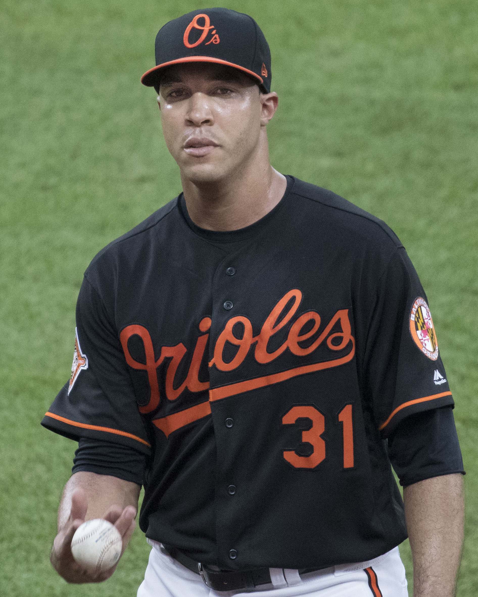 Astros at Orioles 7/21/17